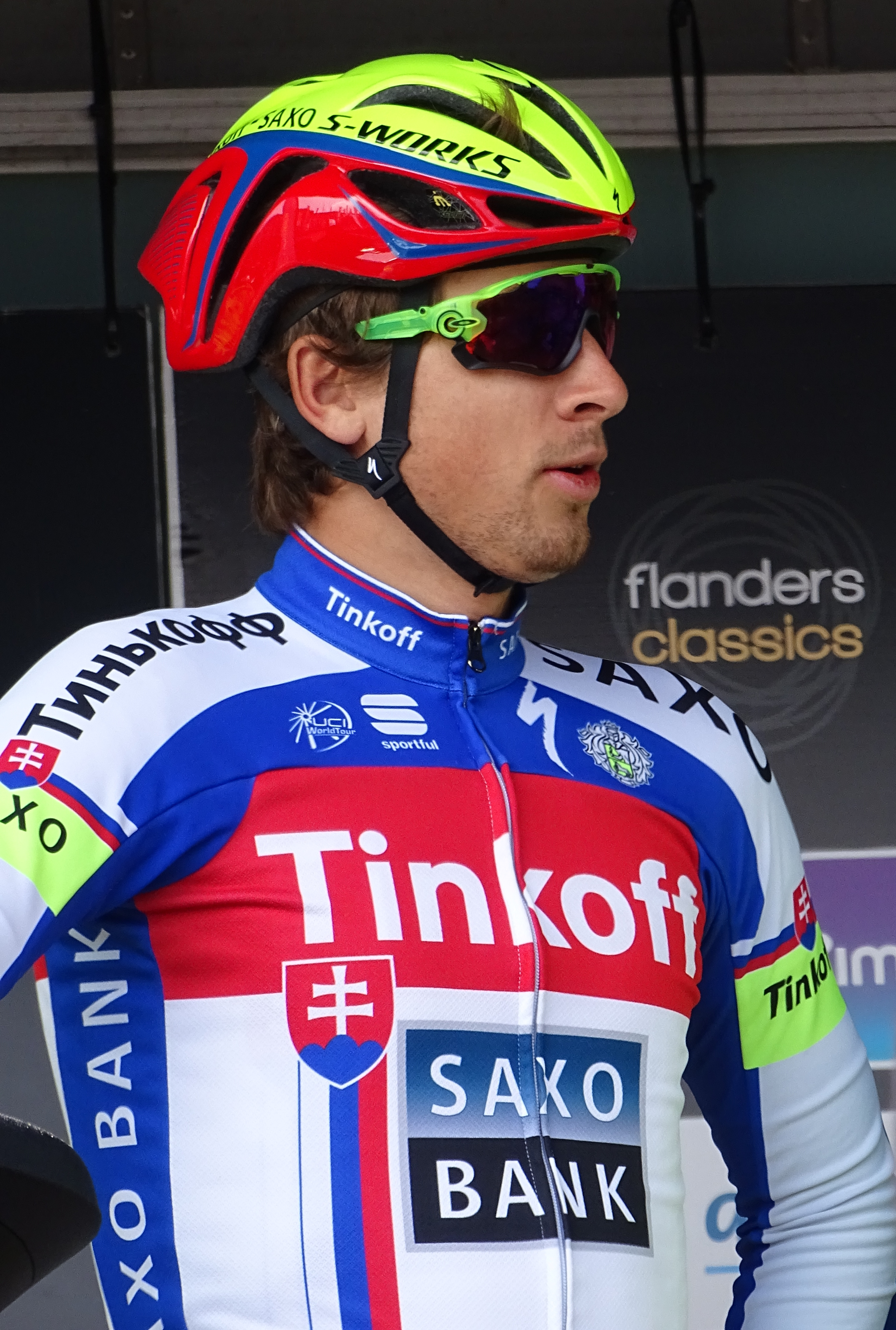 Reportage réalisé le mercredi 8 avril à l'occasion du départ du Grand Prix de l'Escaut 2015 à Anvers, Belgique.